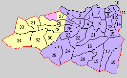 大分県大分郡の町村制時点の町村。